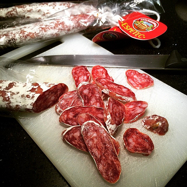 Corte de espetec Casa Tarradellas.